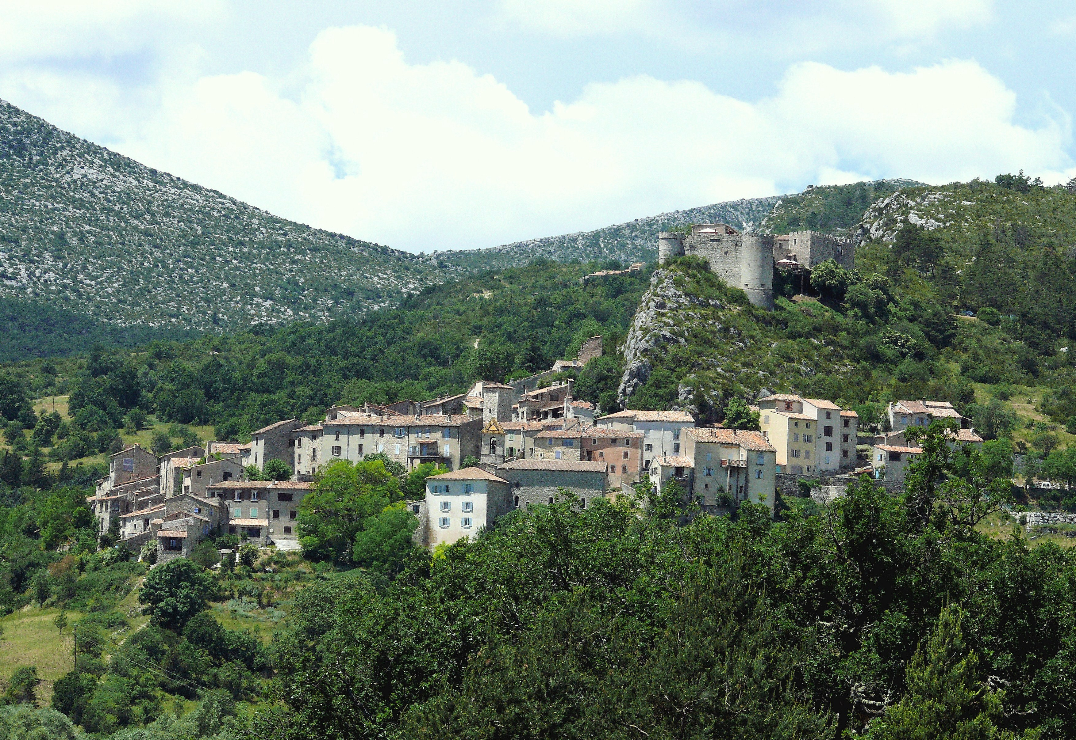 Trigance - Vue d'ensemble avec le château